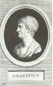 Sallustio